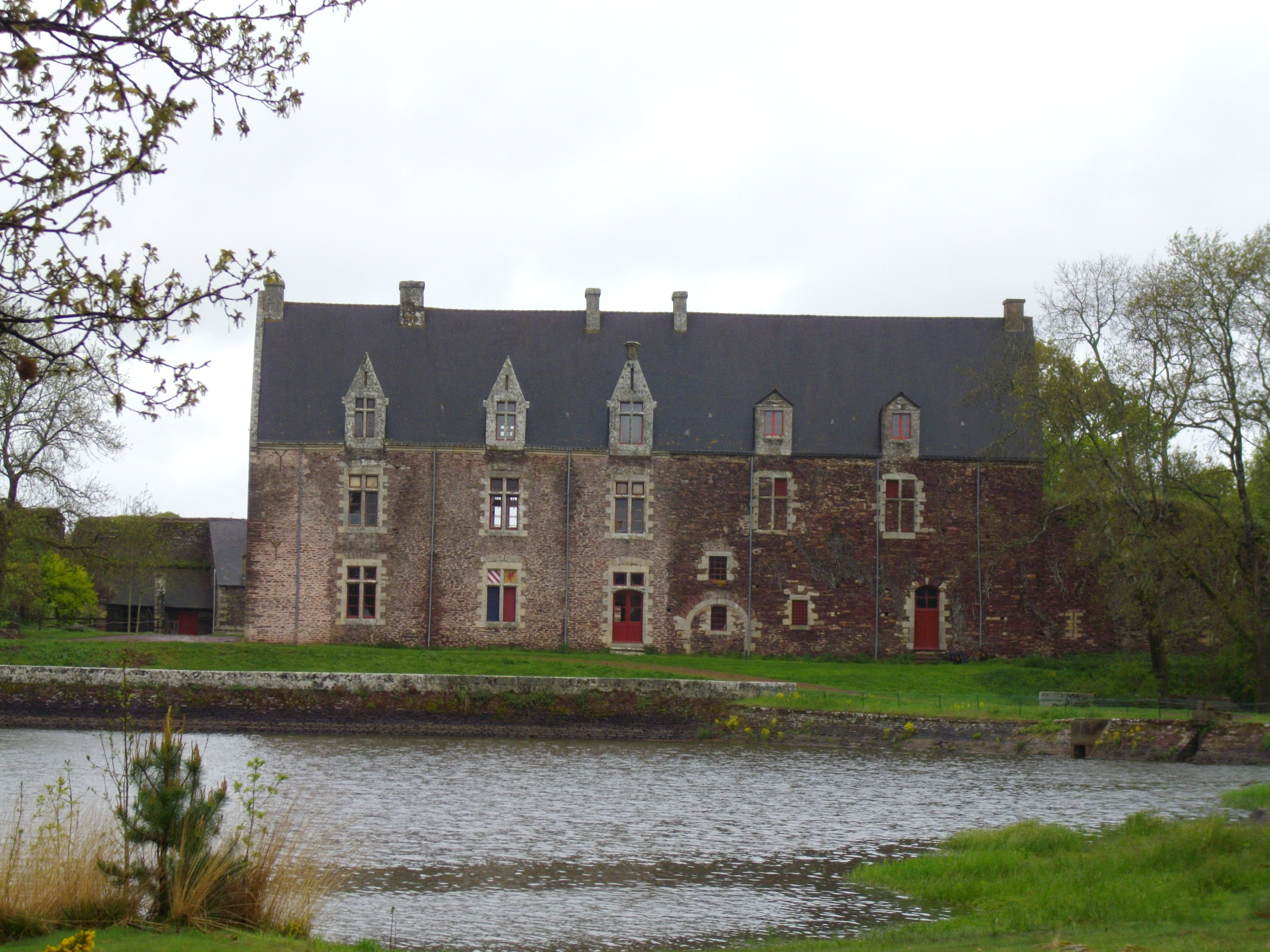 Chateau de Comper, Centre de l'Imaginaire Arthurien